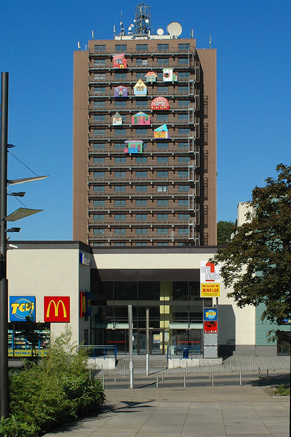 Bergkamen Cityturm